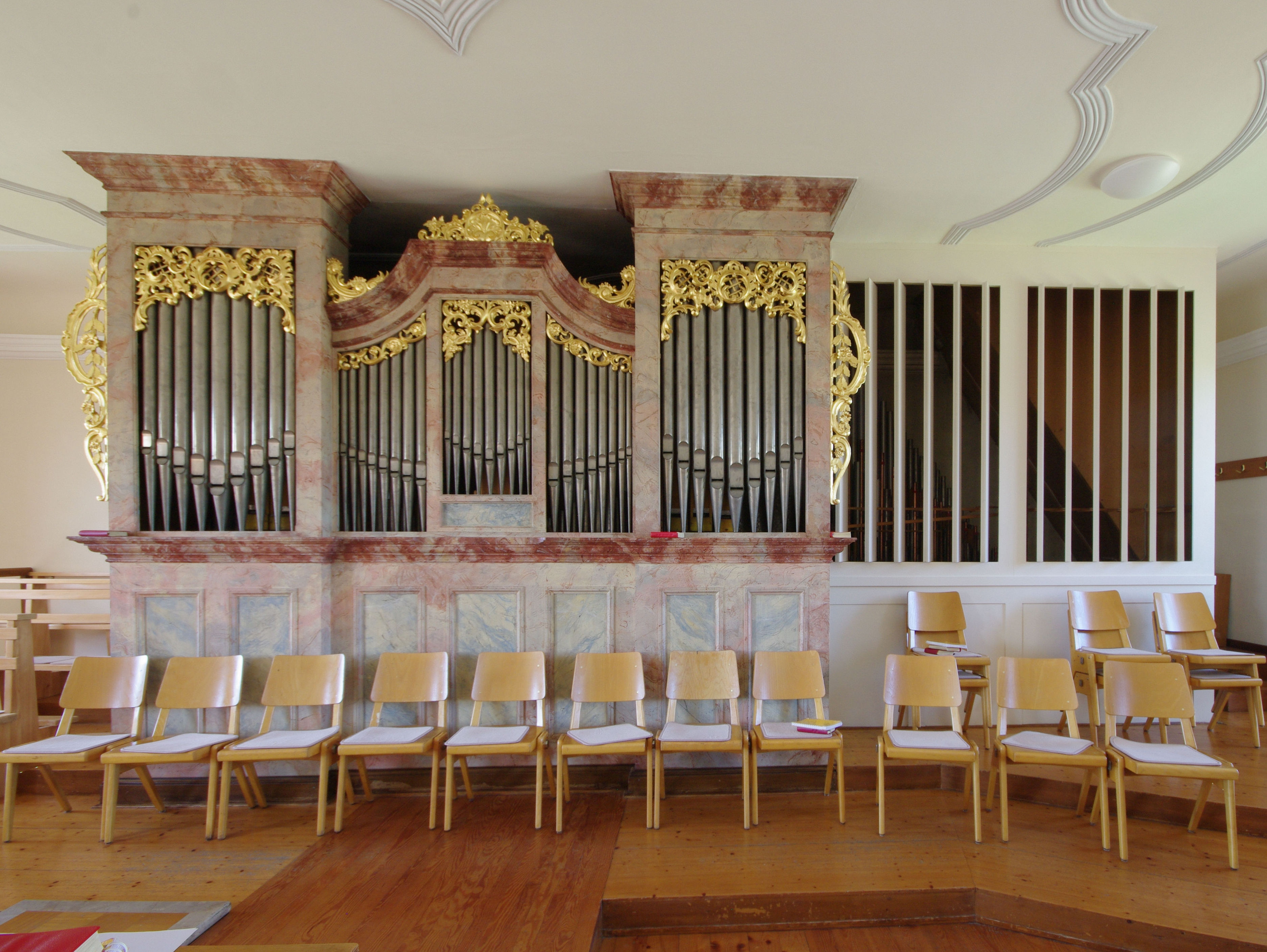 Die Orgel von Nikolaus Schuble aus Pfaffenweiler aus dem Jaher 1808